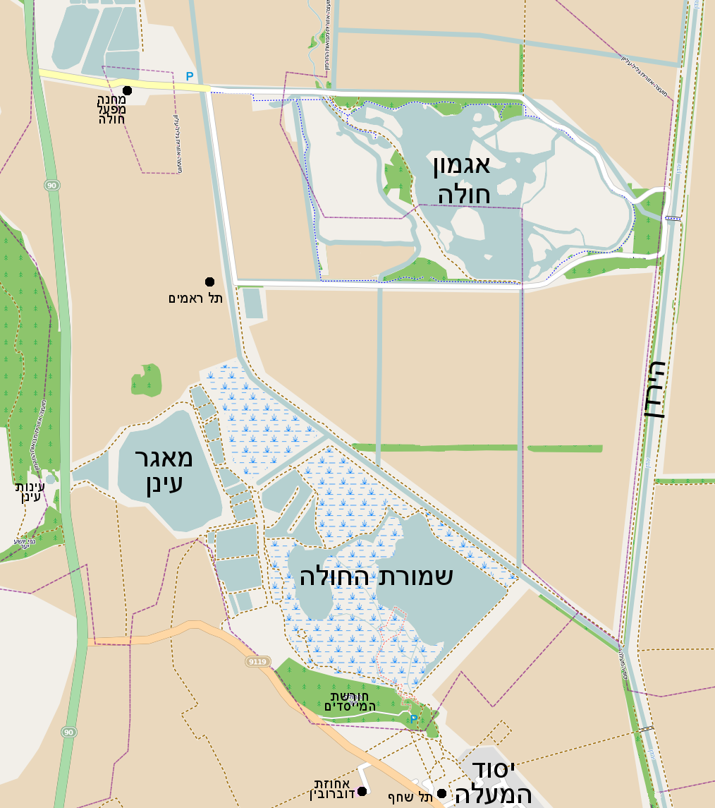 Hula map